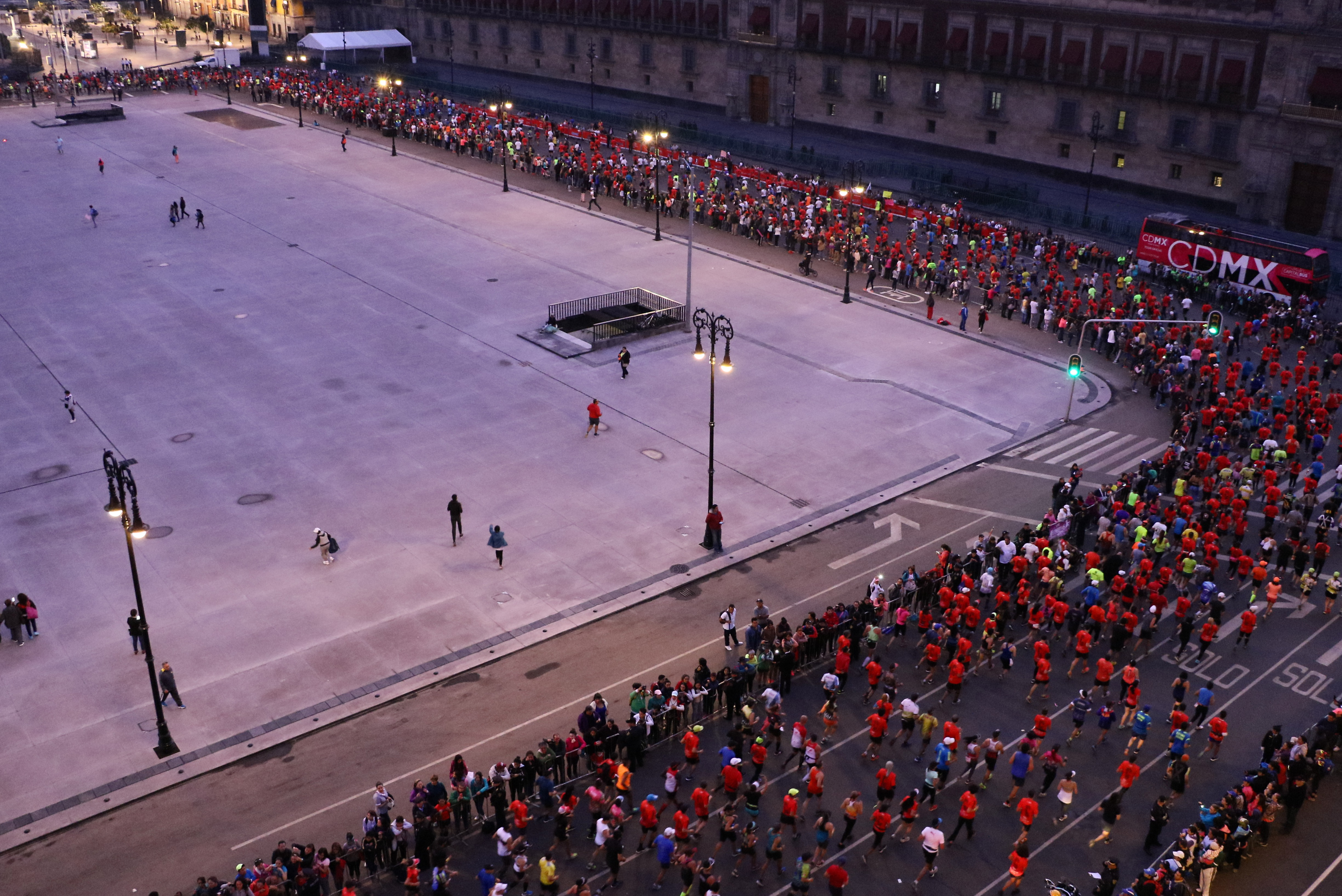 Premiación del XXXV Maratón de la Ciudad de México, Telcel 2017